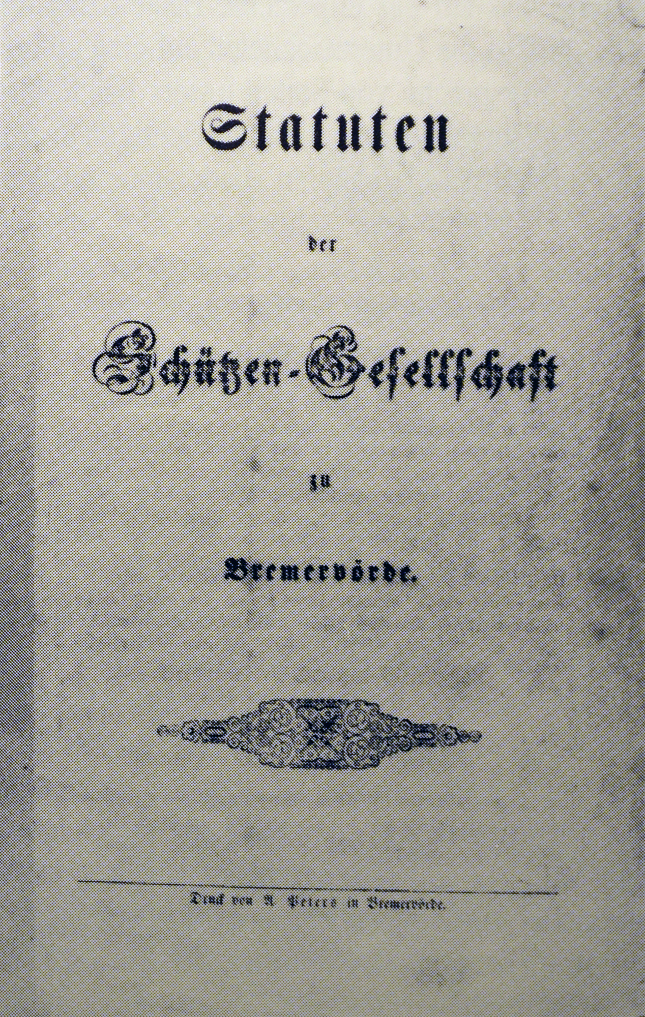 Statuten der Schützengesellschaft zu Bremervörde, Stadt Bremervörde, 1856.